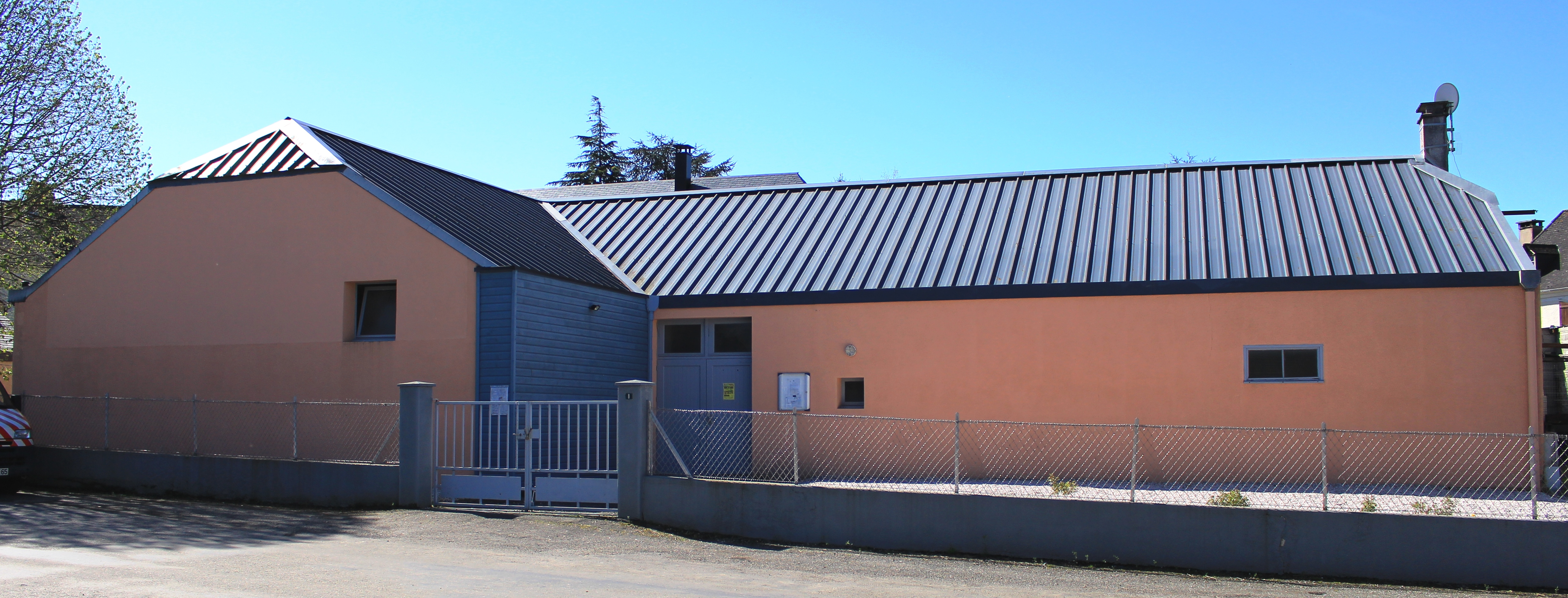 Salle des fêtes de Loubajac (Hautes-Pyrénées)